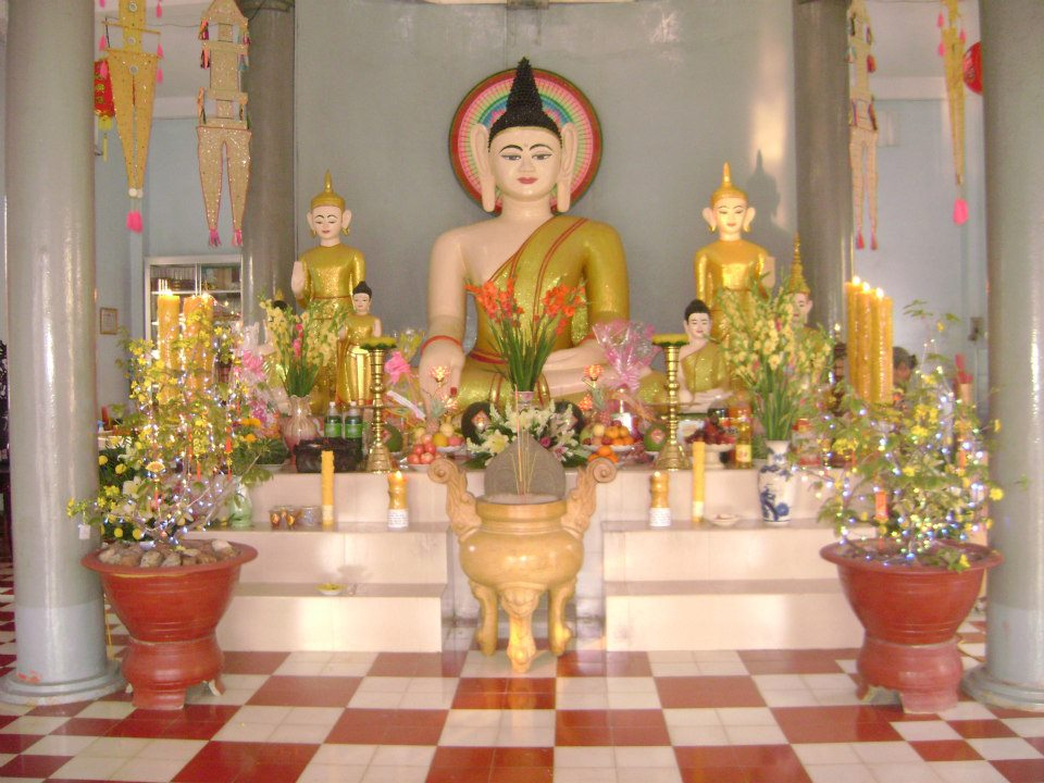 Hà Tiên